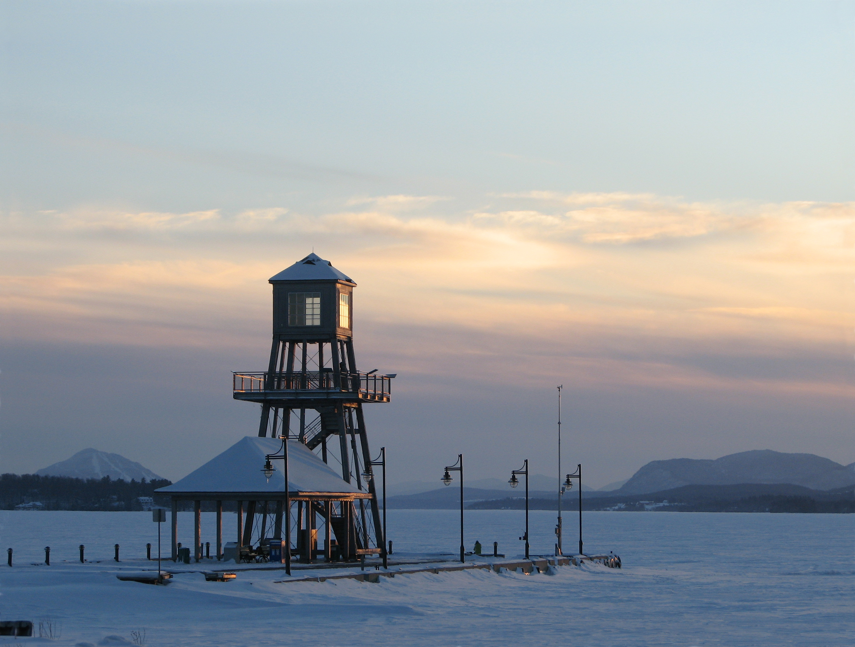 Lac Memphremagog au soleil couchant en hiver.